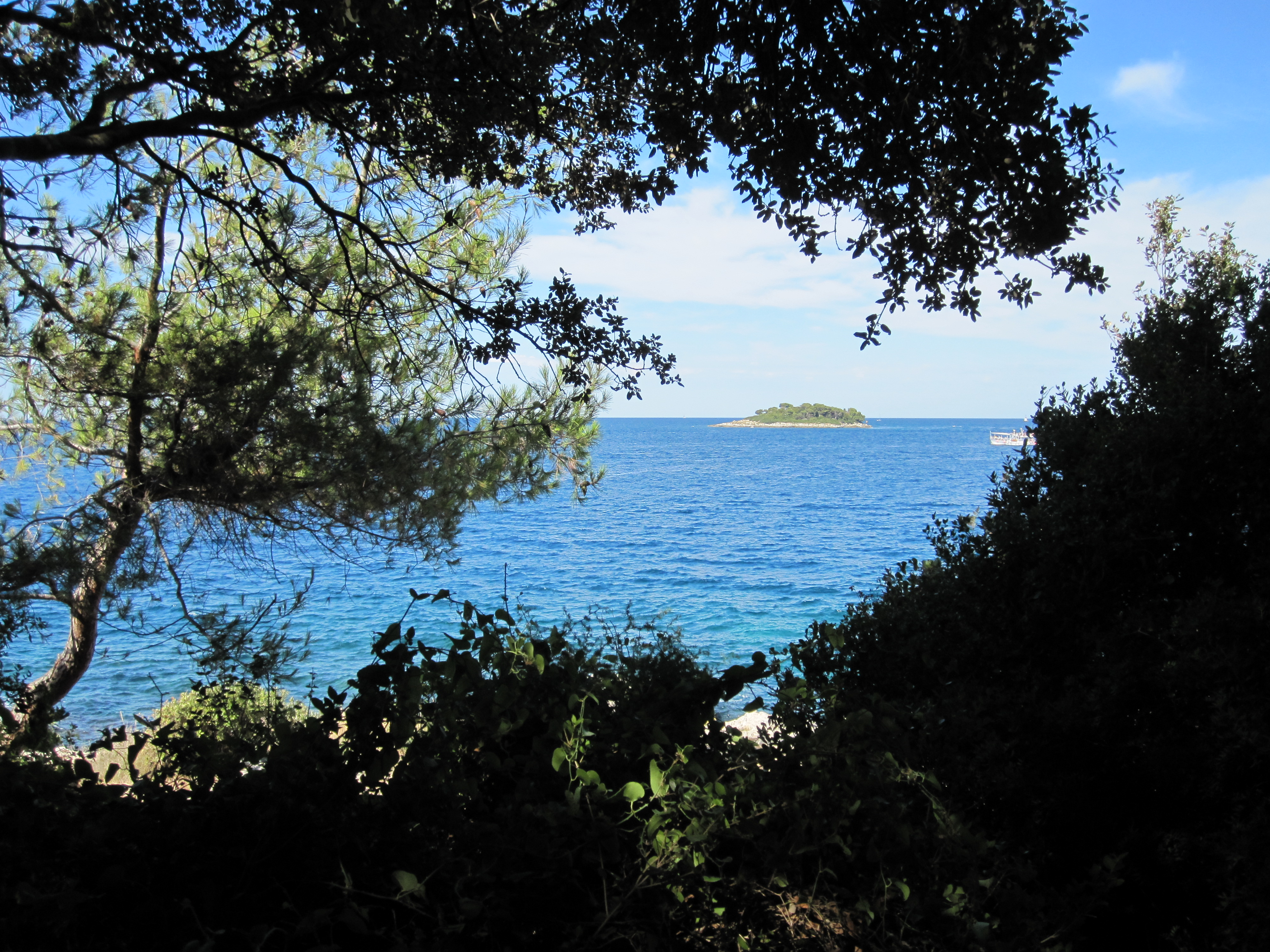 Otočić Lunga, Vrsar, Hrvatska.